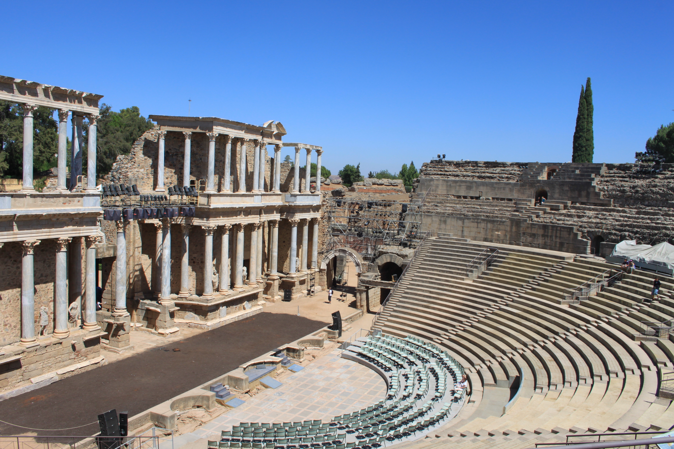 Teatre Romà de Mèrida